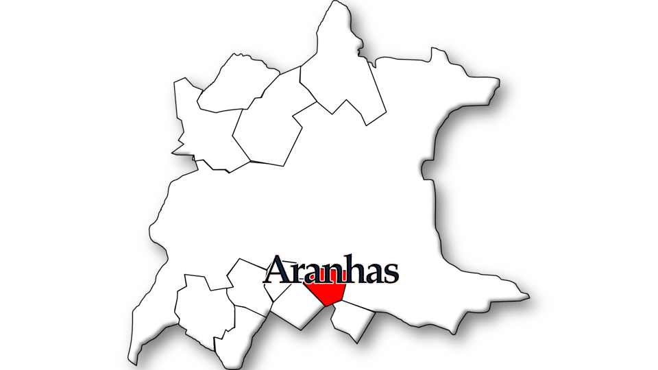 População